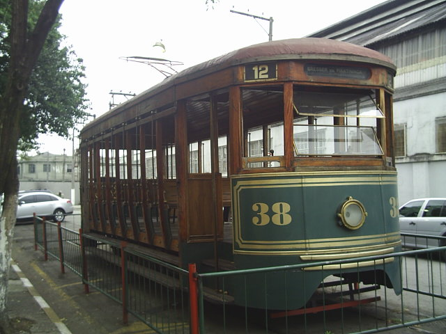 Bonde do Memorial do Imigrante, Mooca, São Paulo, SP, Brasil.